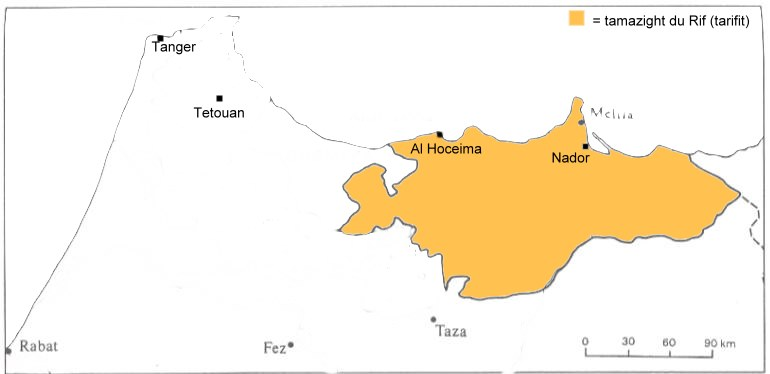 خريطة لغة تاريفيت الأمازيغية